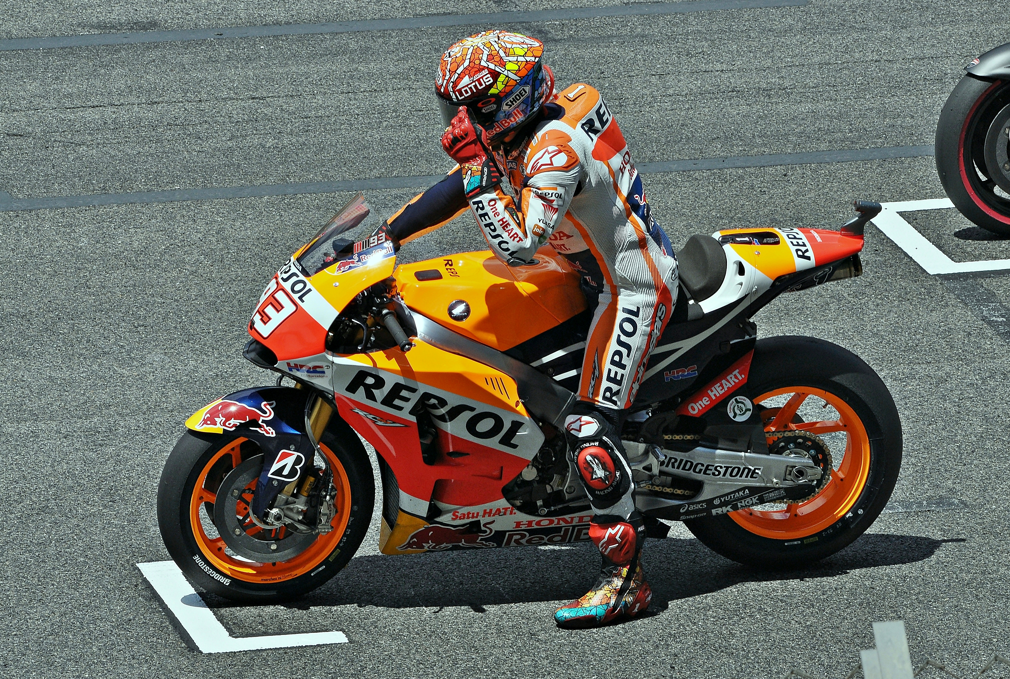 gran premio de cataluña